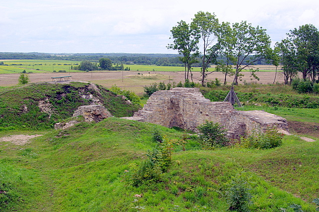 Lihula linnuse lõuamüür.